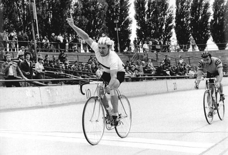 Bodo Straubel ADN-ZB Link 22.7.84 Berlin: 78. Rennen Rund um Berlin - Der DHfK-Starter Bodo Straubel überquerte als Erster die Ziellinie auf der Radrennbahn Weißensee und entschied damit das 197-km-Rennen zu seinen Gunsten. Nach dem DDR-Meister ging Hans-Joachim Meisch vom SC Turbine Erfurt als Zweiter über die Ziellinie.